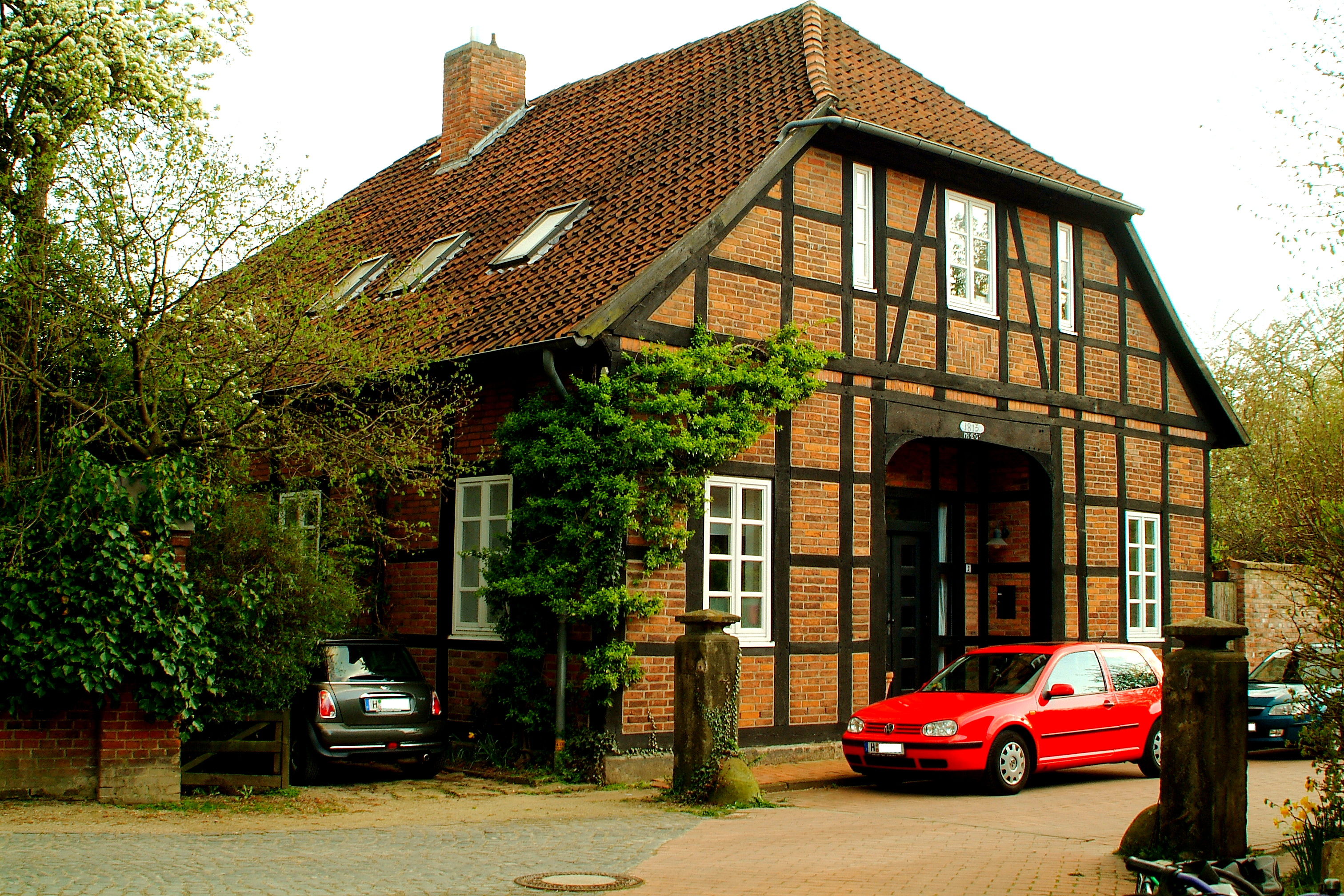 Sie haben ein besseres Bild? Sogar ein historisches Dokument als Bild(ungsförderung)? Zeigen Sie' s uns. Stiften Sie es, allen Menschen.